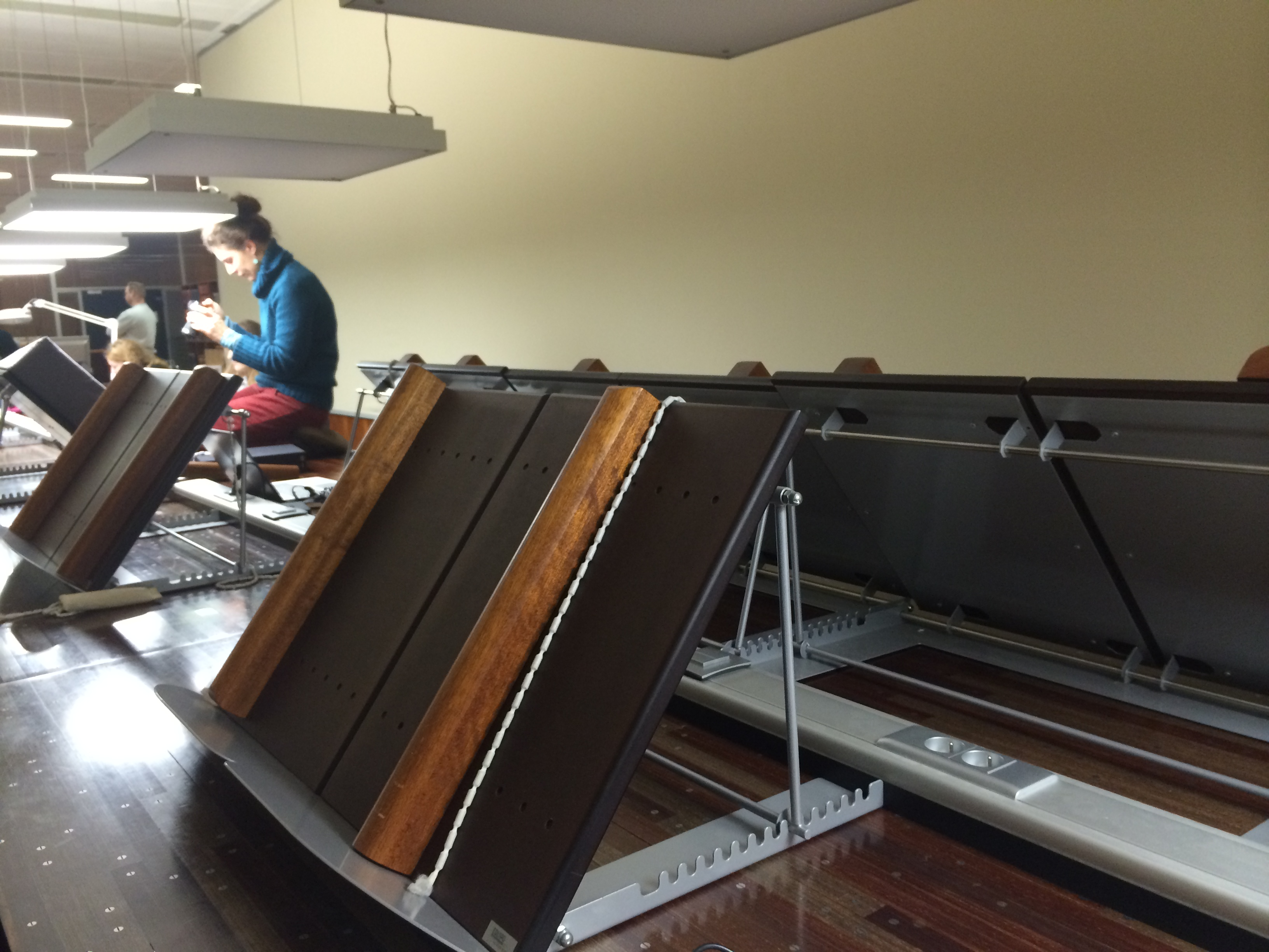 Зал манускриптов Королевской библиотеки Бельгии, г. Брюссель